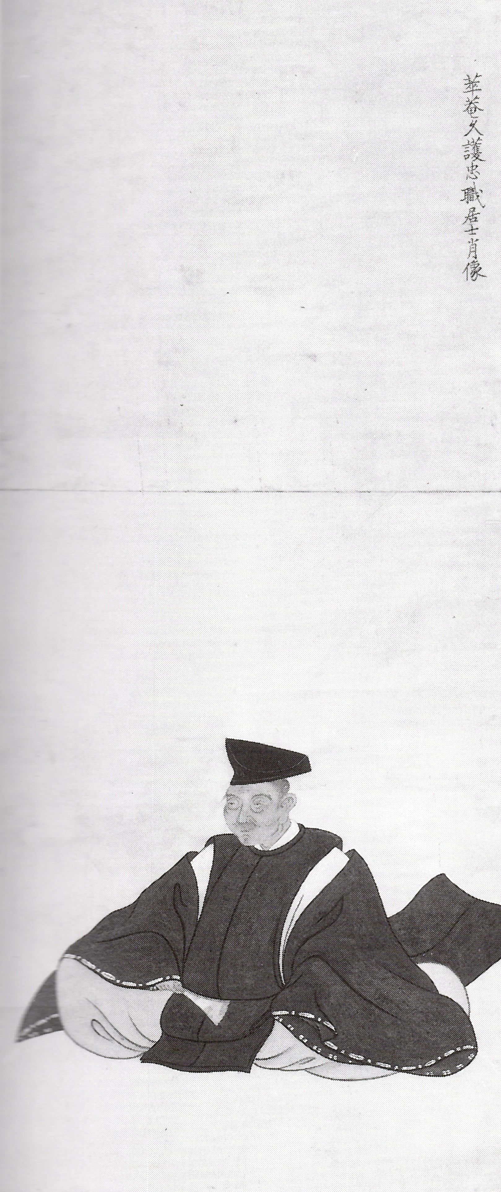 平田(中原)職忠の肖像。